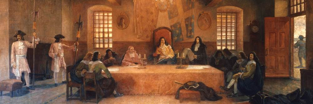 Le Conseil souverain, tableau de Charles Huot L'ouverture du Conseil souverain en 1663 Sur le fauteuil, le gouverneur de la Nouvelle-France, Daniel de Rémy de Courcelles À sa droite, le vicaire apostolique de la Nouvelle-France, François de Montmorency-Laval À sa gauche, l'intendant de la Nouvelle-France, Jean Talon Et cinq conseillers